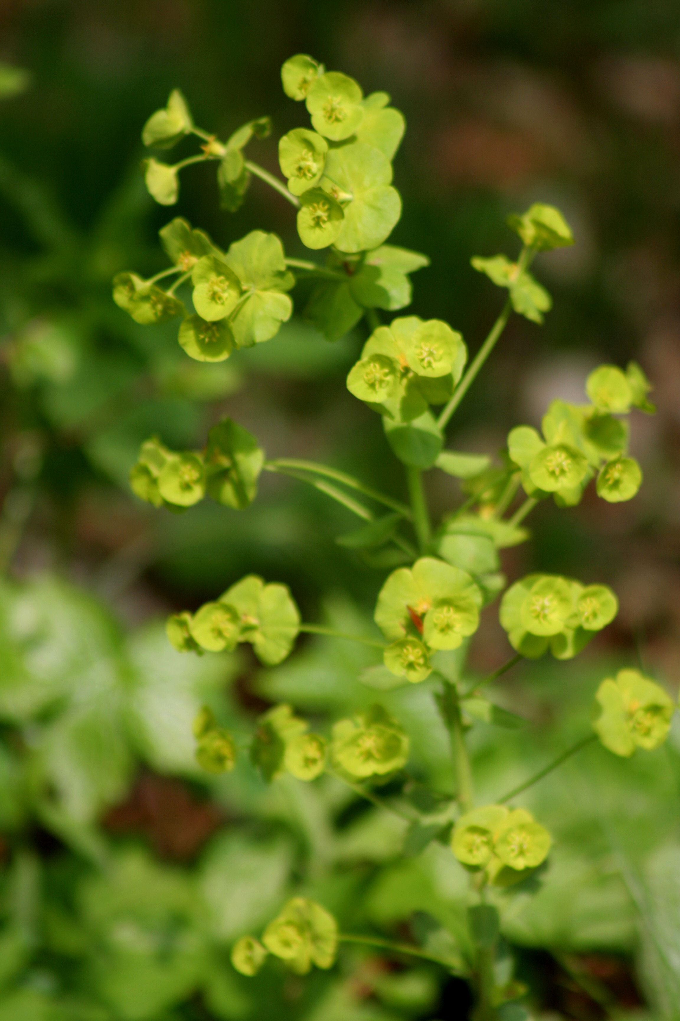 Euphorbia_amygdaloides - Località : Melere, Trichiana (BL), 843 m s.l.m.